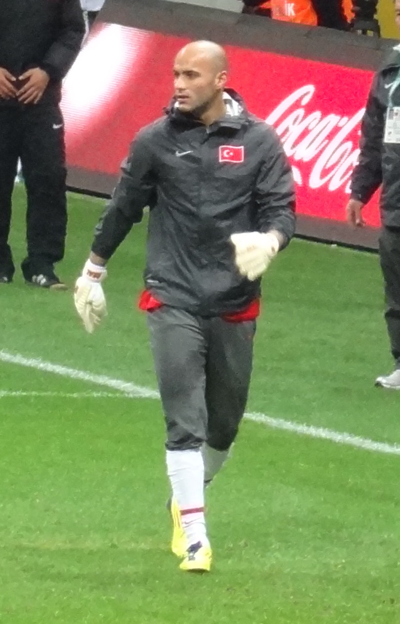 Sinan Bolat with Turkey @ Croatia match